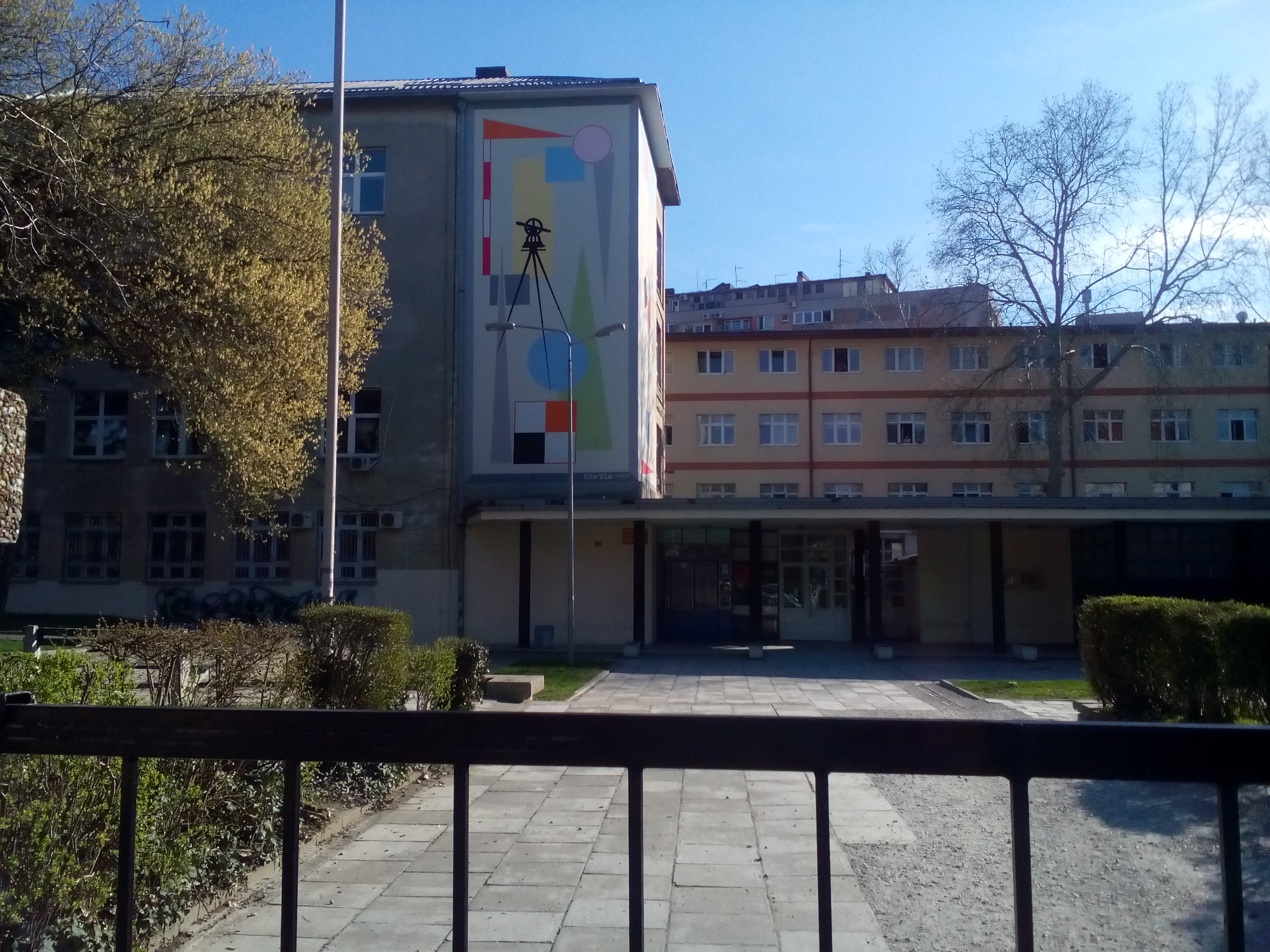 Српски (ћирилица): Ulaz u Geodetsku tehničku skolu u Beogradu